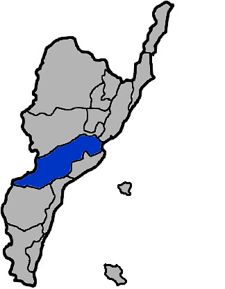 本圖係小籃子為編輯臺灣省臺東縣卑南鄉所改繪，感謝KJ提供原圖。